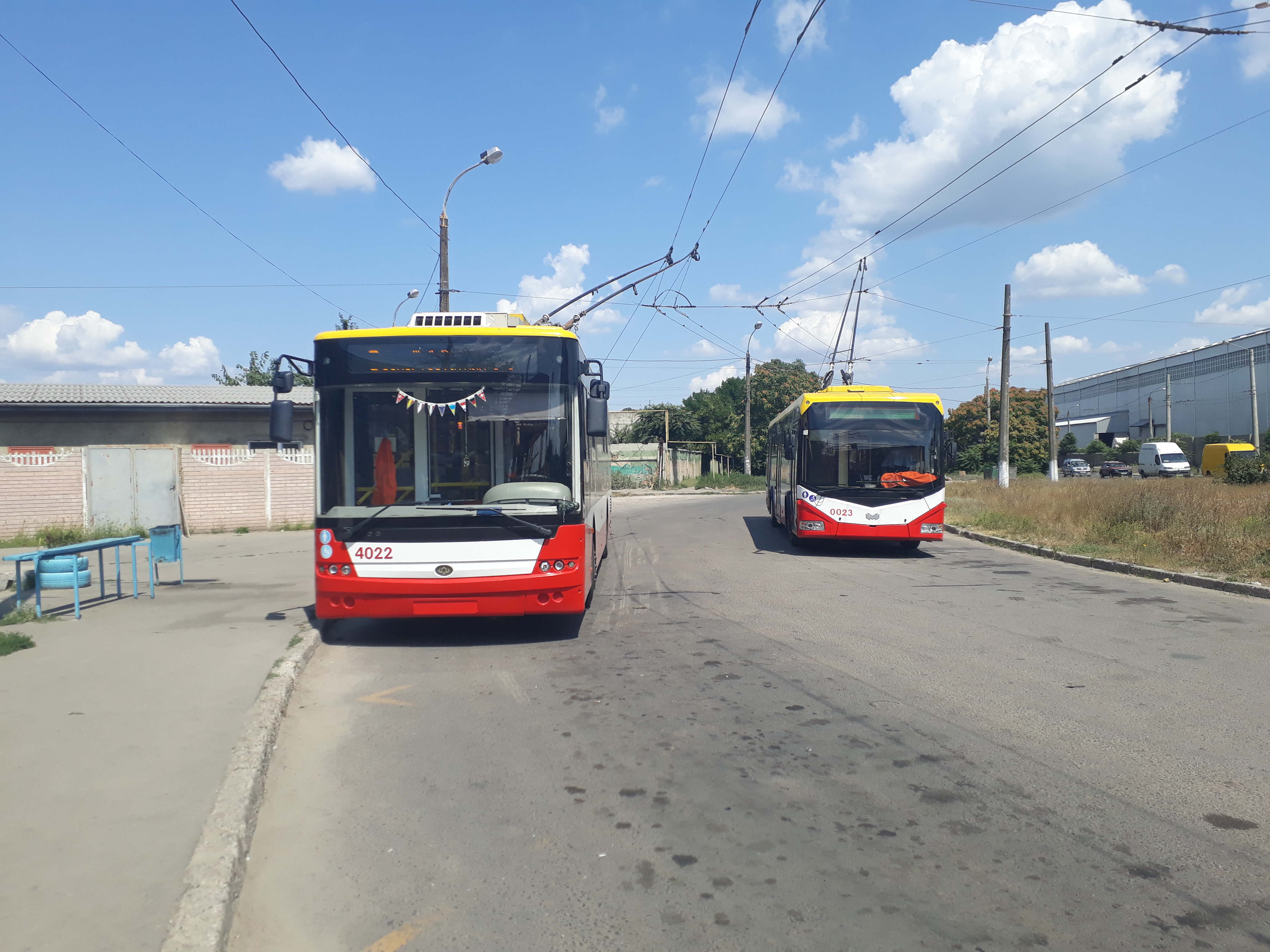 Тролейбуси Бкм321 та Богдан Т70117 на кінцевій Суперфосфатний завод.